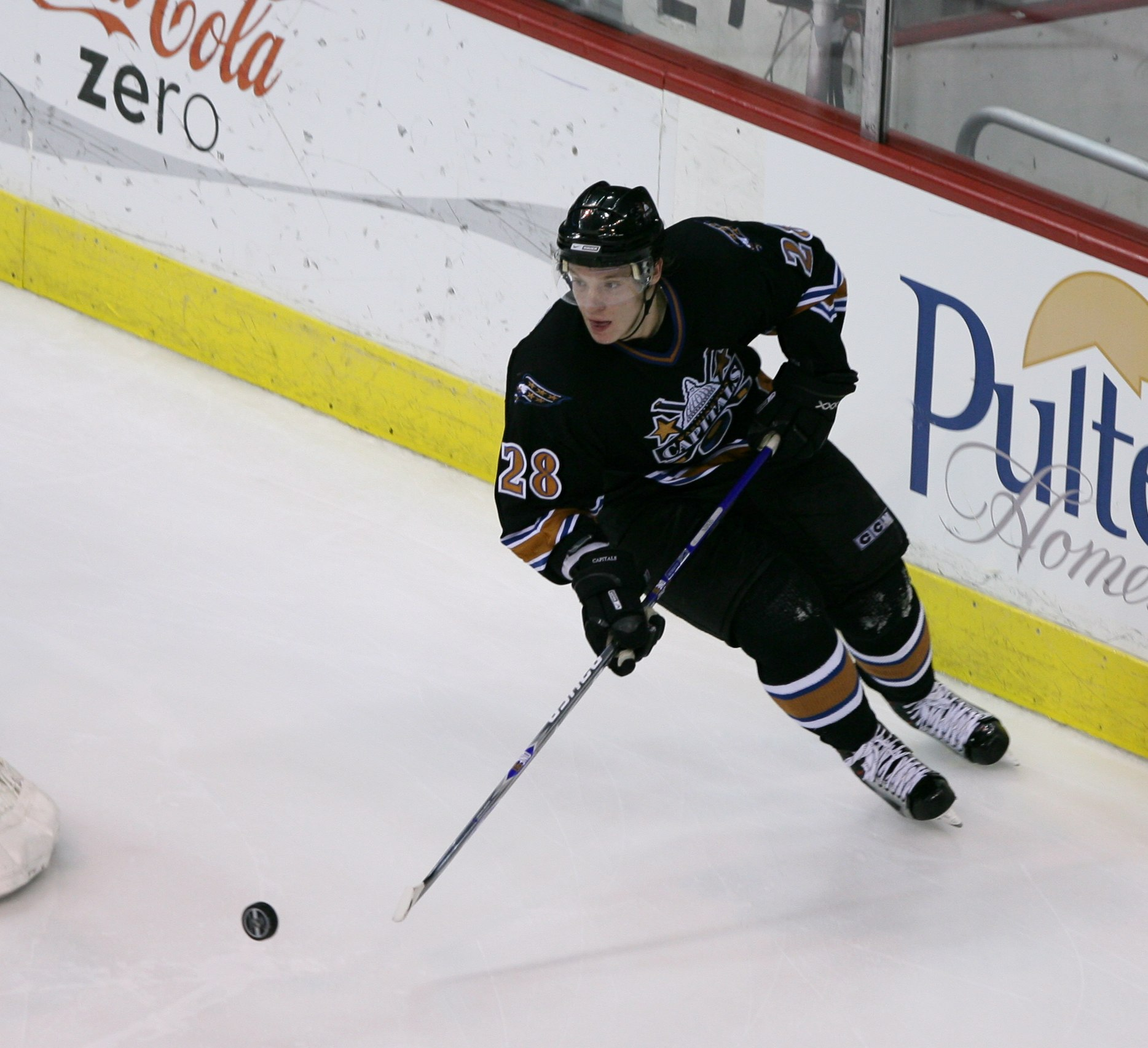 RO9A1254a